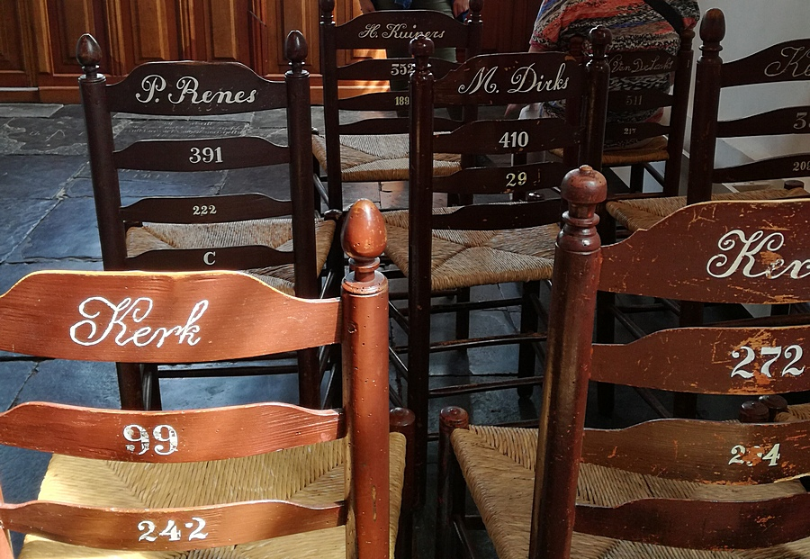 Oude stoelen uit de Grote Kerk van Nijkerk in de kapel van het Zuiderzeemuseum.